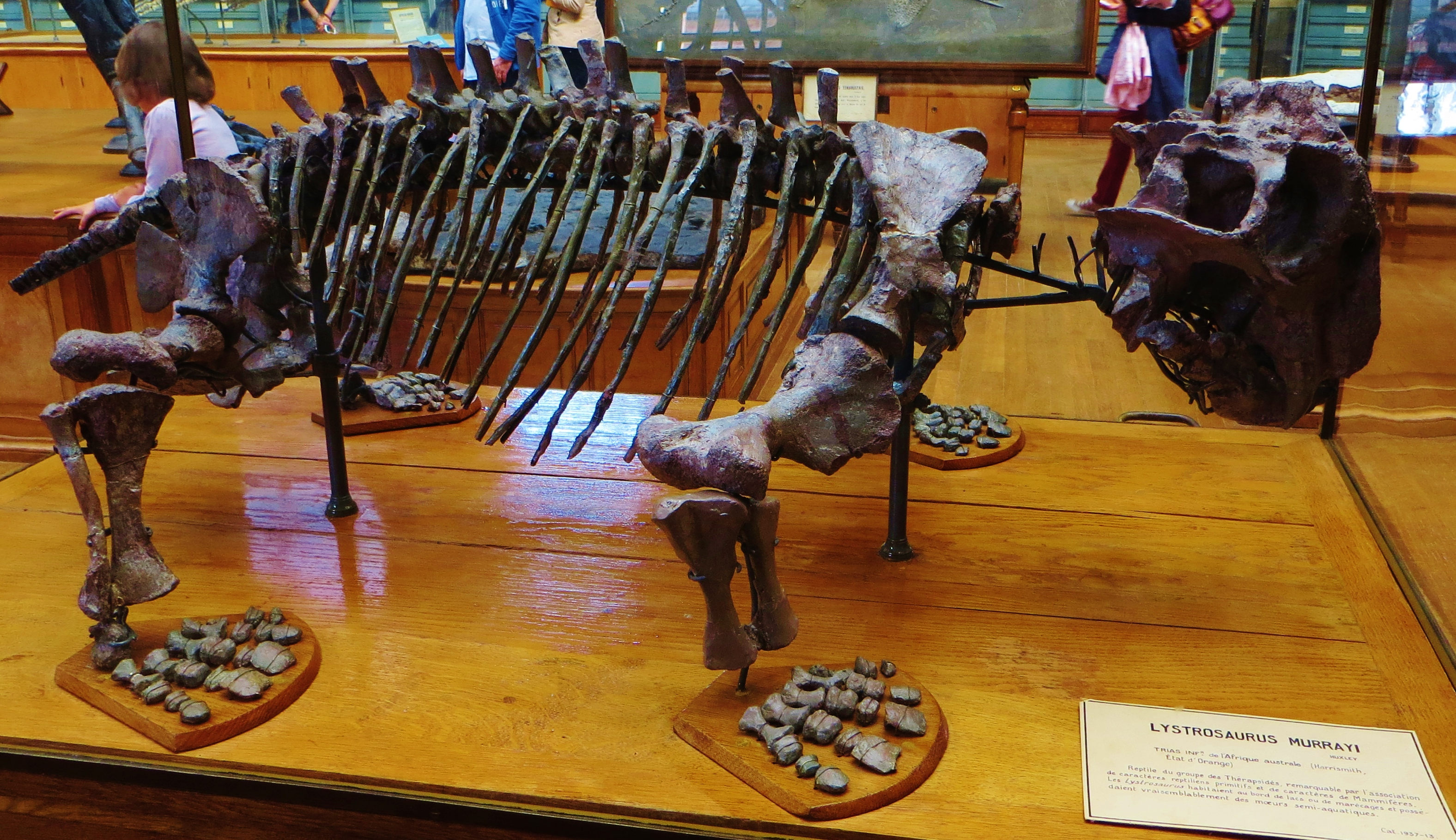 Fossil of Lystrosaurus, an extinct therapsid- Took the photo at Musee d'Histoire Naturelle, Paris